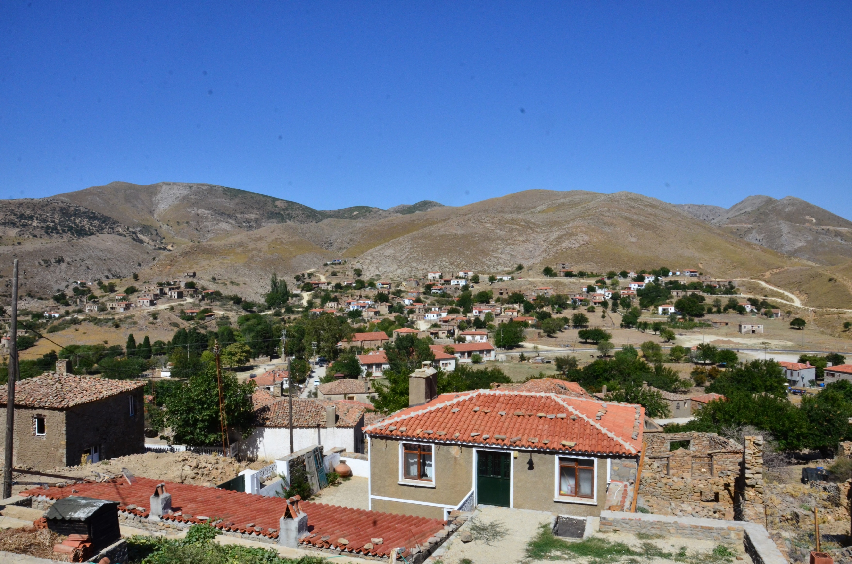 Dereköy Manzarası